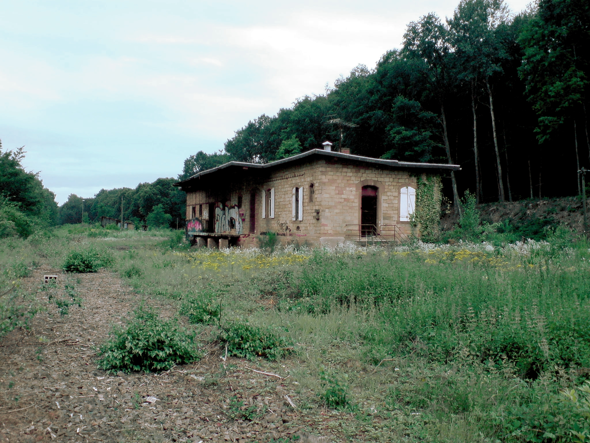 Jägersburger Bahnhof Güterabfertigung von den Gleisen aus gesehen.